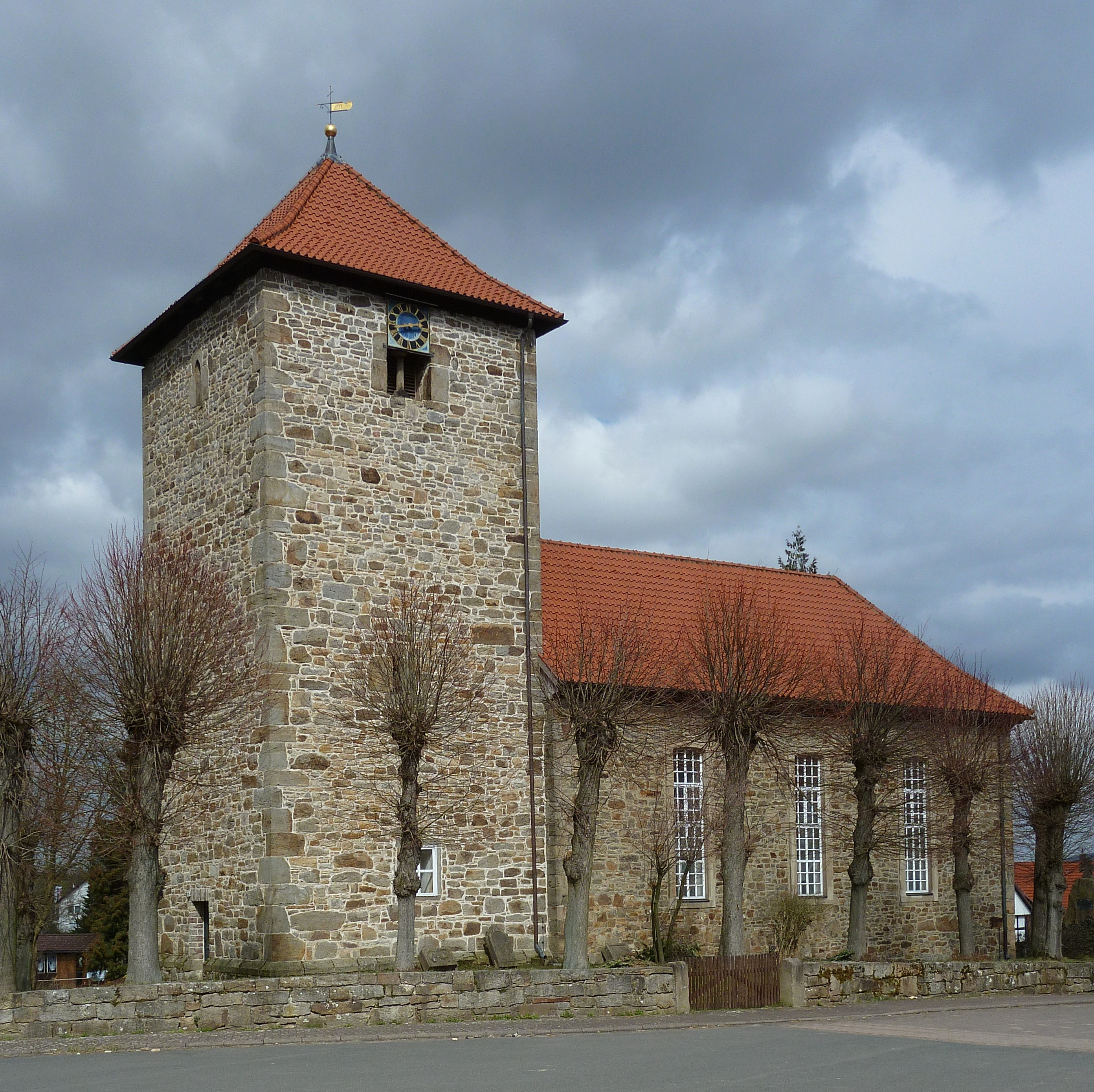 Ev.-luth. Kirche in Bühren, Samtgemeinde Dransfeld, Südniedersachsen. Um 1150 als annähernd quadratischer Bau mit halbrunder Ostapsis errichtet, um 1220 Anbau des Wehrturms im Westen mit Tonnengewölbe im Erdgeschoss, nach 1380 Rechteckchor statt Rundapsis errichtet. 1757-1777 Umbau des Schiffs zu einem flachgedeckten Saal. Glocken von 1473 und vor 1350. Liegt an einem Abstecjher des Pilgerwegs Loccum-Volkenroda.